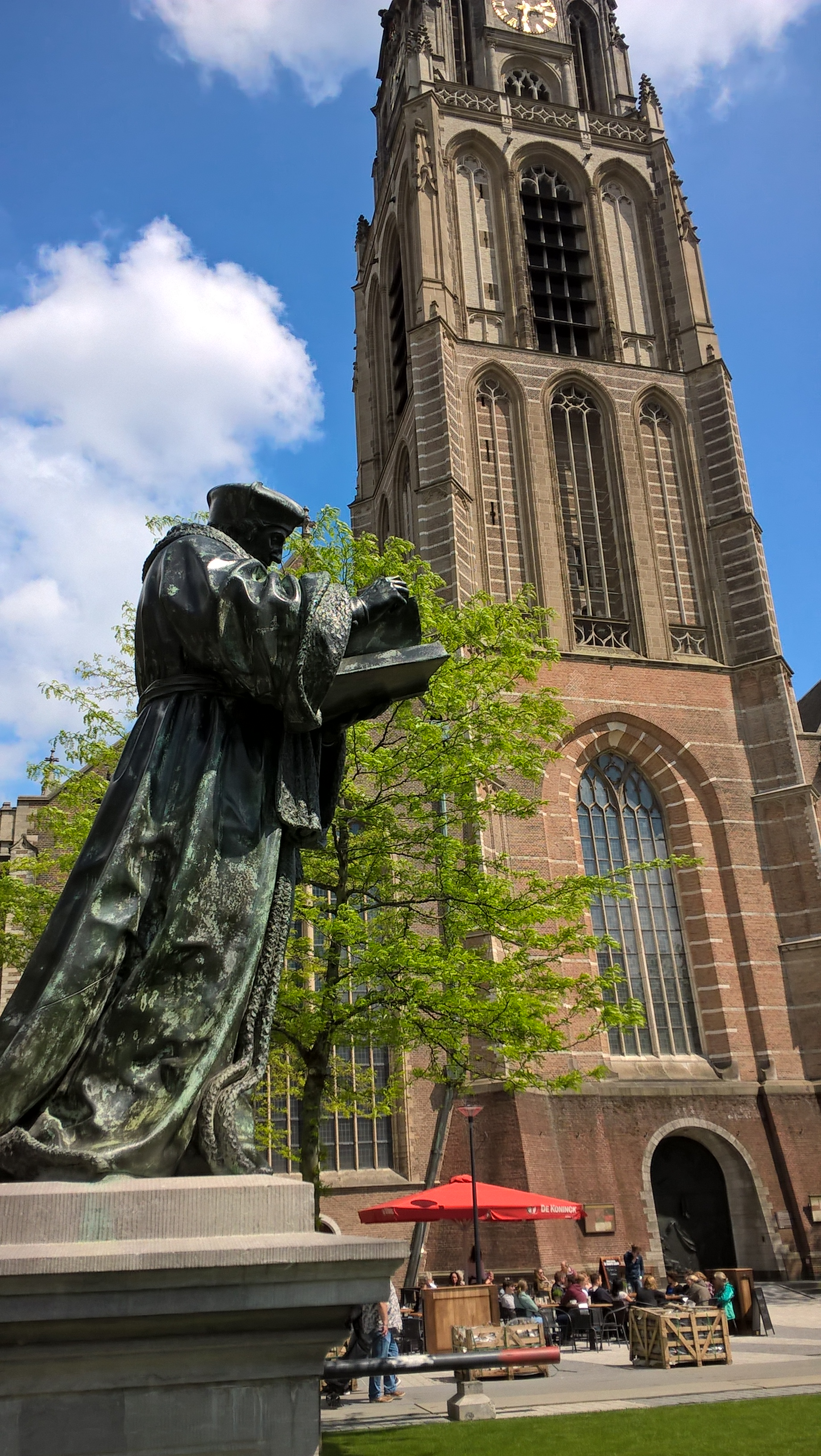 Desiderius Erasmus Rotterdamus statue's to Rotterdam, in Neederlands.